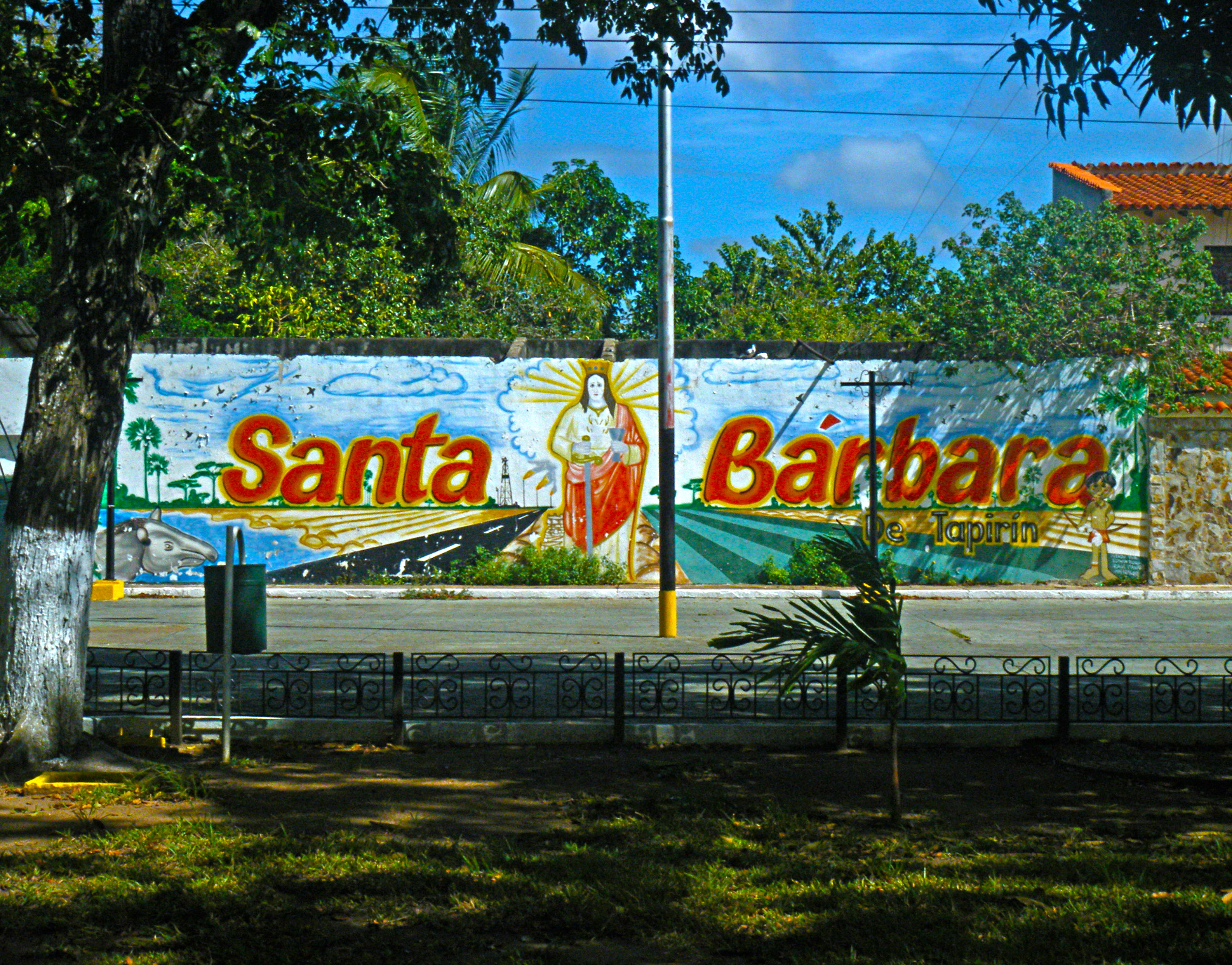 Mural de Santa Bárbara, Monagas, al frente de la Plaza Bolivar de la misma localidad.